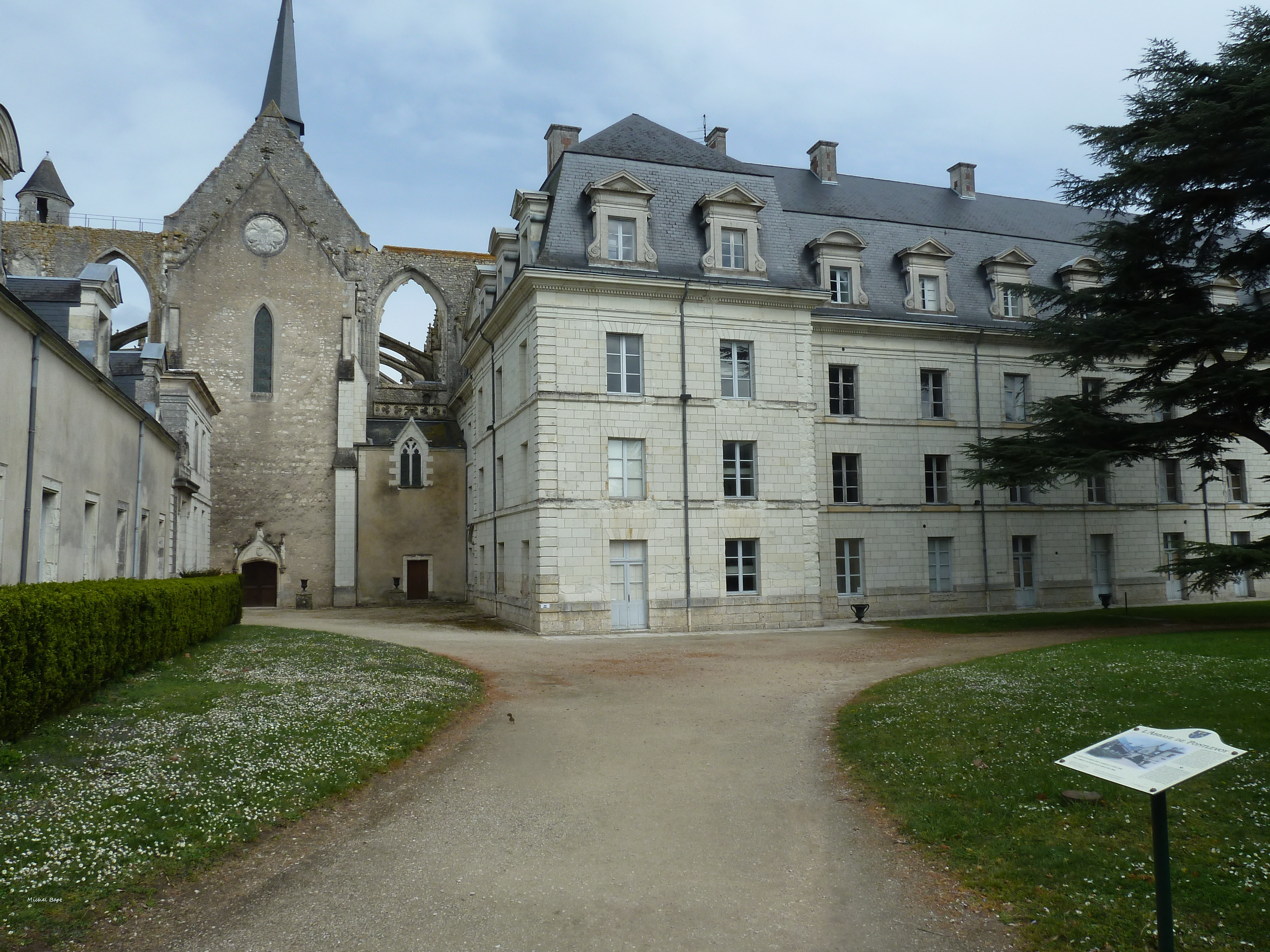 Abbaye bénédictine de la Congrégation de Saint Maur .